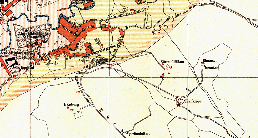 Kart over Ekebergskrenten, 1887